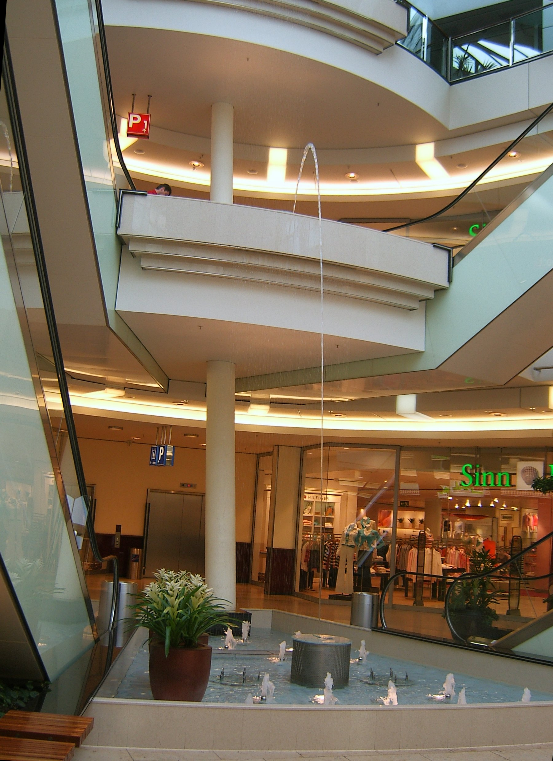 Hamburg, Wilstorf, Phönix-Center